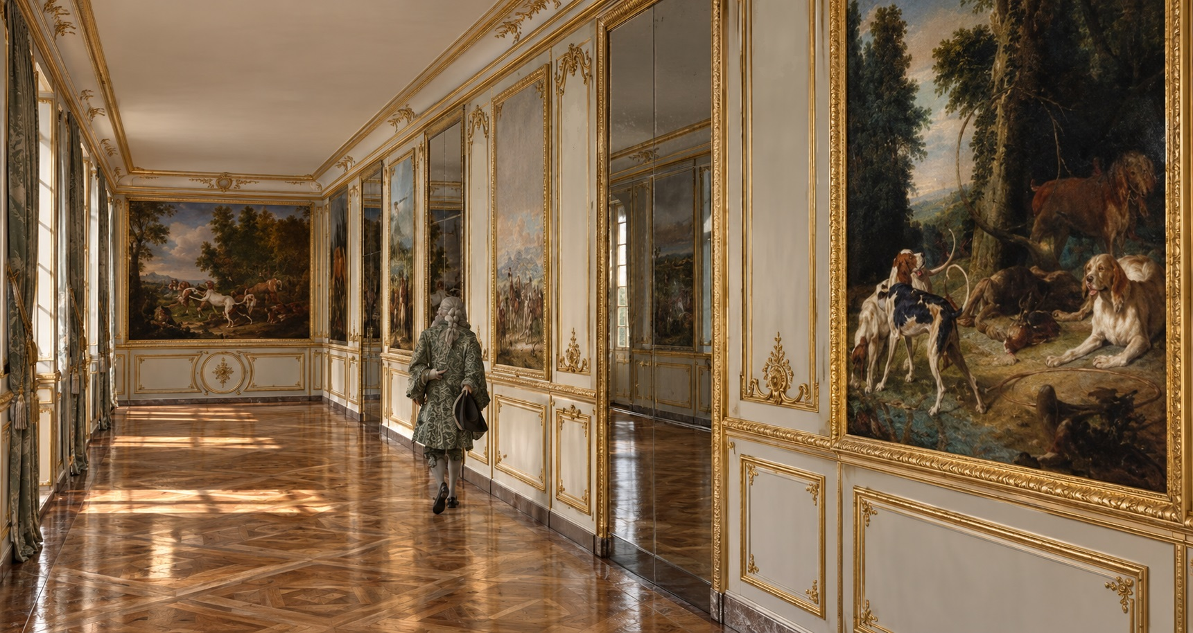 Essai de restitution de la galerie de communication, aile des marronniers du château de Meudon, état vers 1703-1711.